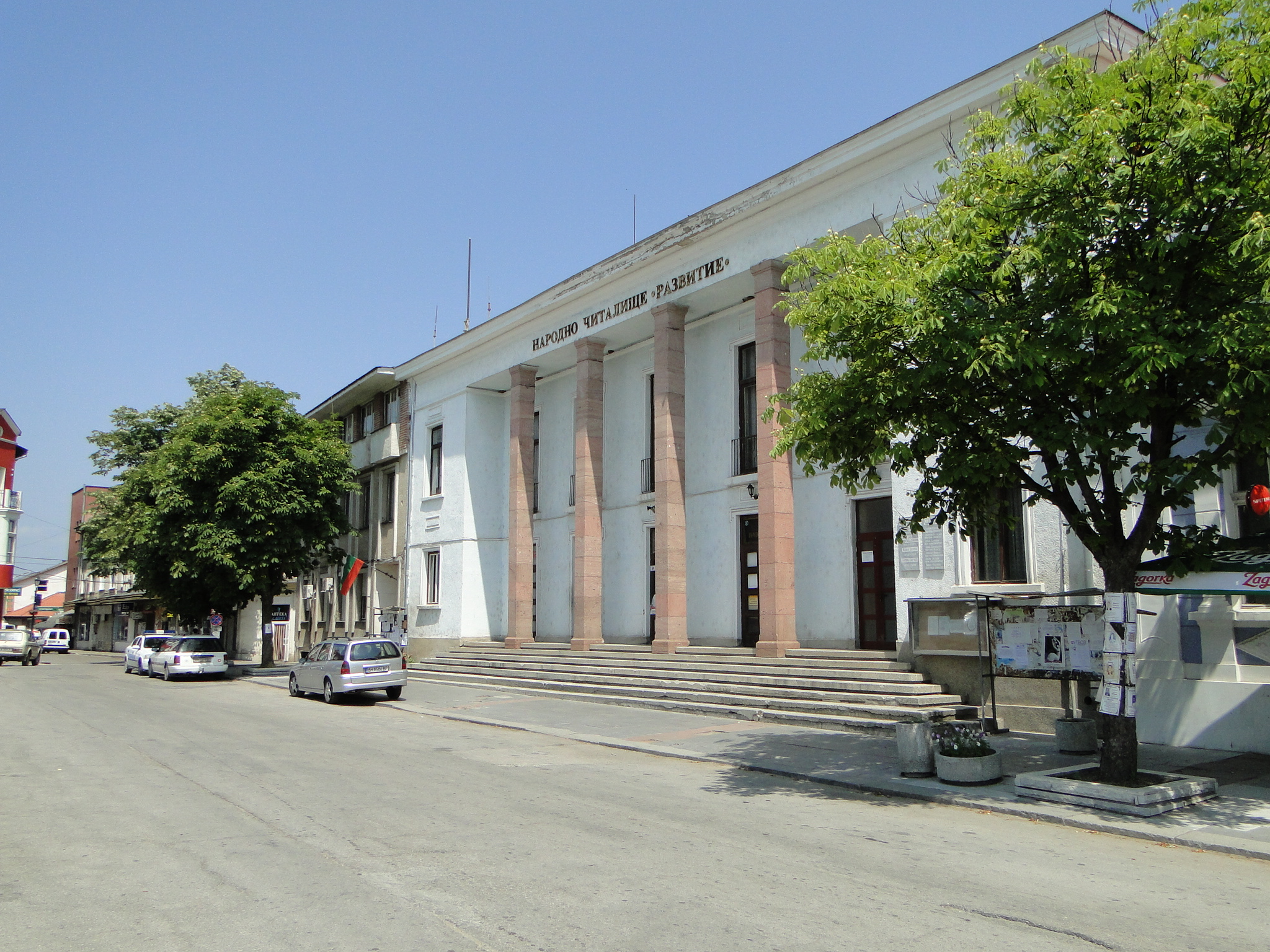 Белоградчик